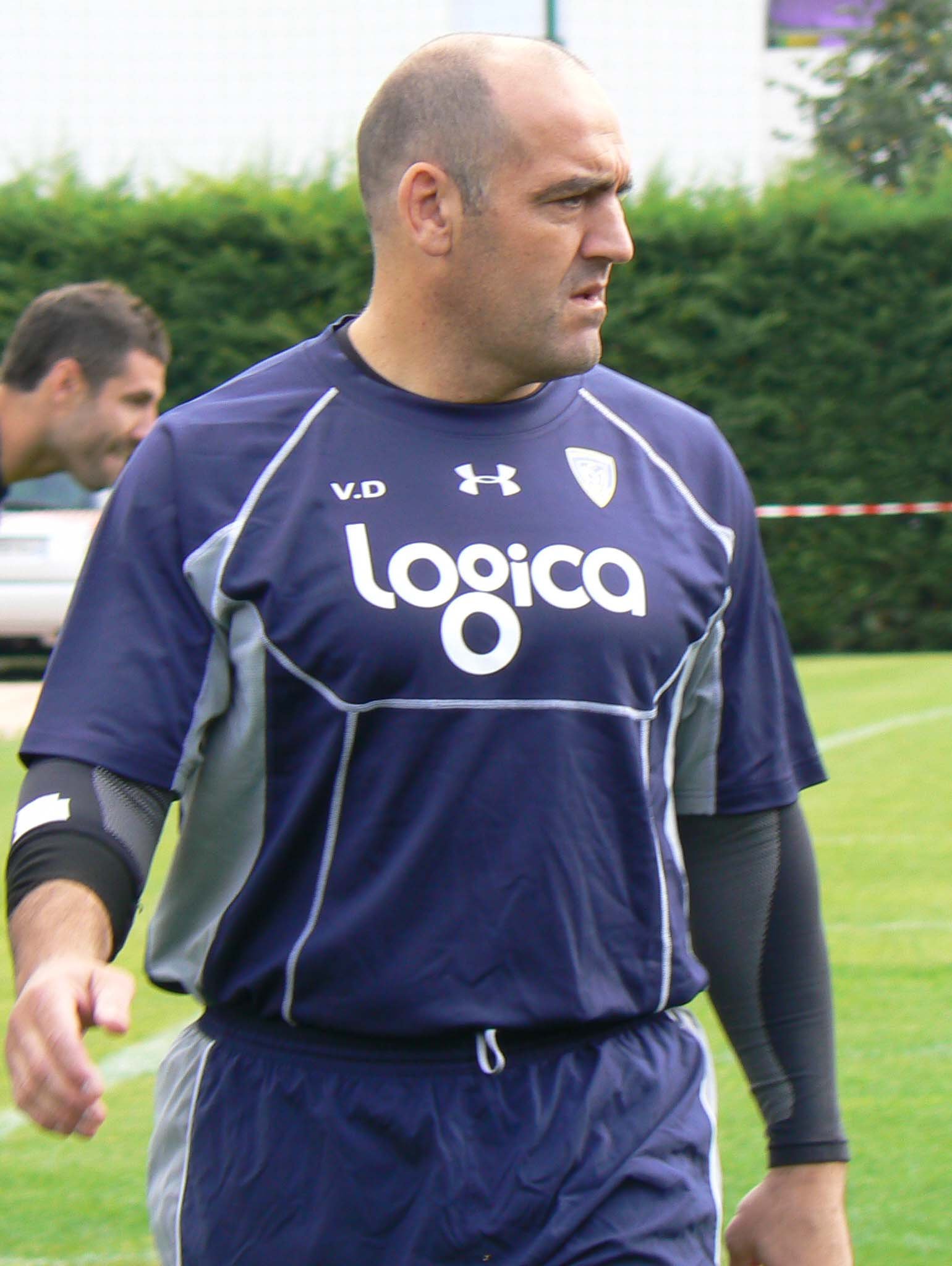 Le rugbyman international argentin Mario Ledesma lors d'un entraînement avec l'ASM Clermont Auvergne